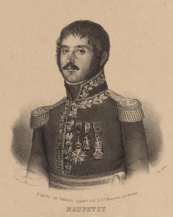 Pierre Maupetit (1771-1811), général de brigade du Premier Empire. Il se taille une réputation d'intrépidité dans la cavalerie et se distingue particulièrement en 1805 à la bataille de Wertingen où il est blessé neuf fois. Envoyé en Espagne de 1808 à 1809, il rentre en France pour raison de santé et meurt des suites de ses blessures peu après.